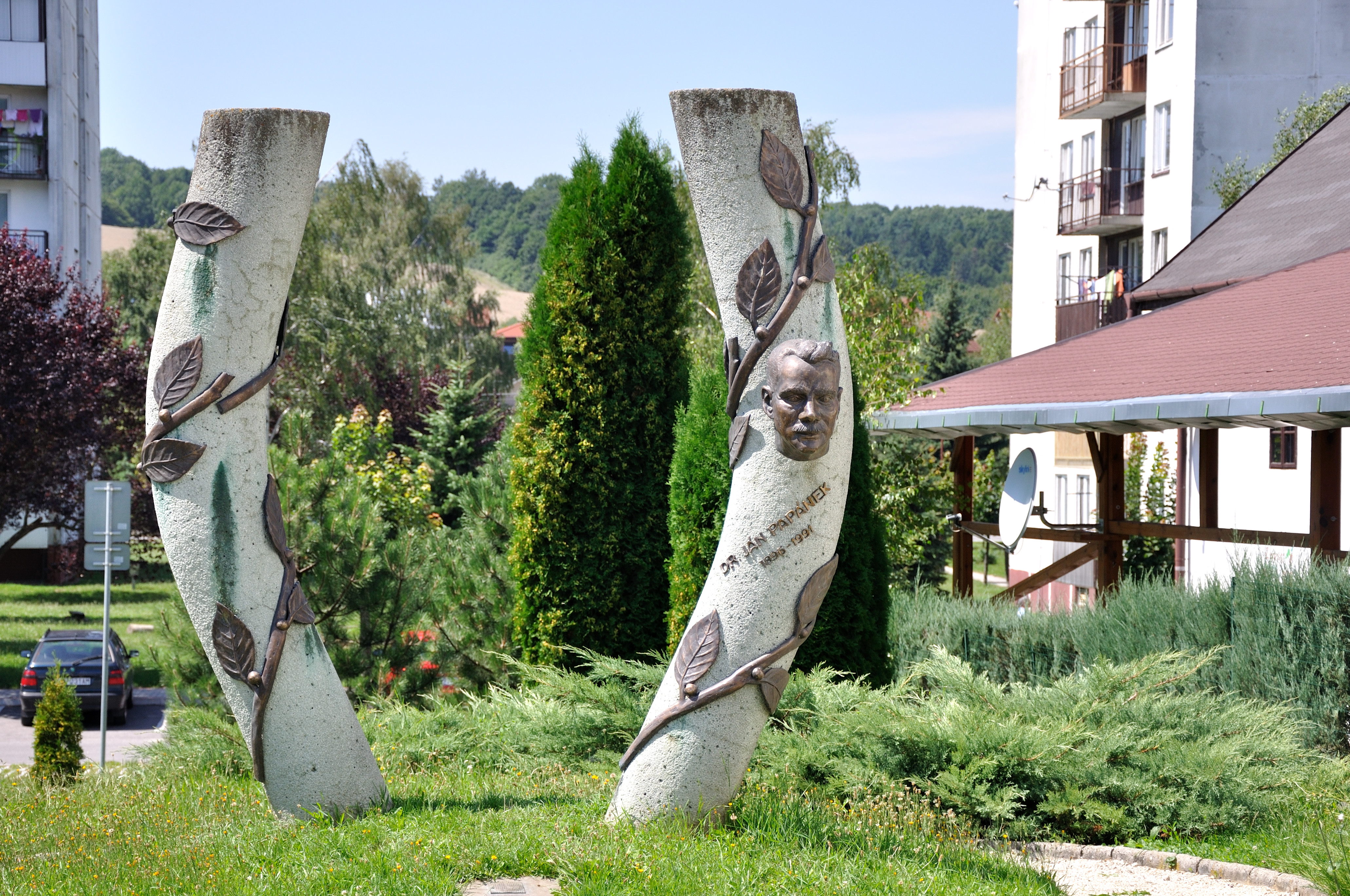 Ján Papánek - pamätník, Brezová pod Bradlom